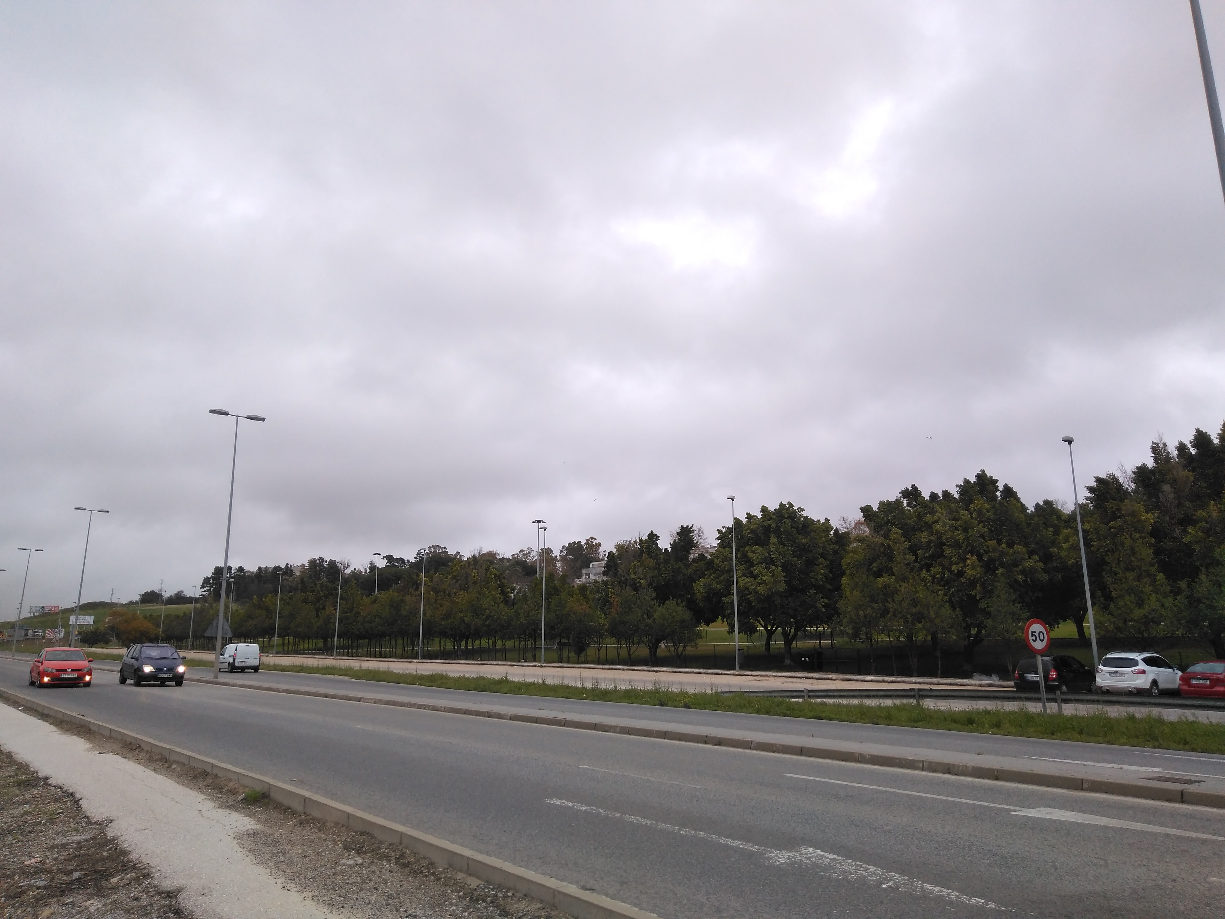 parque de Picadueñas en Jerez de la Frontera